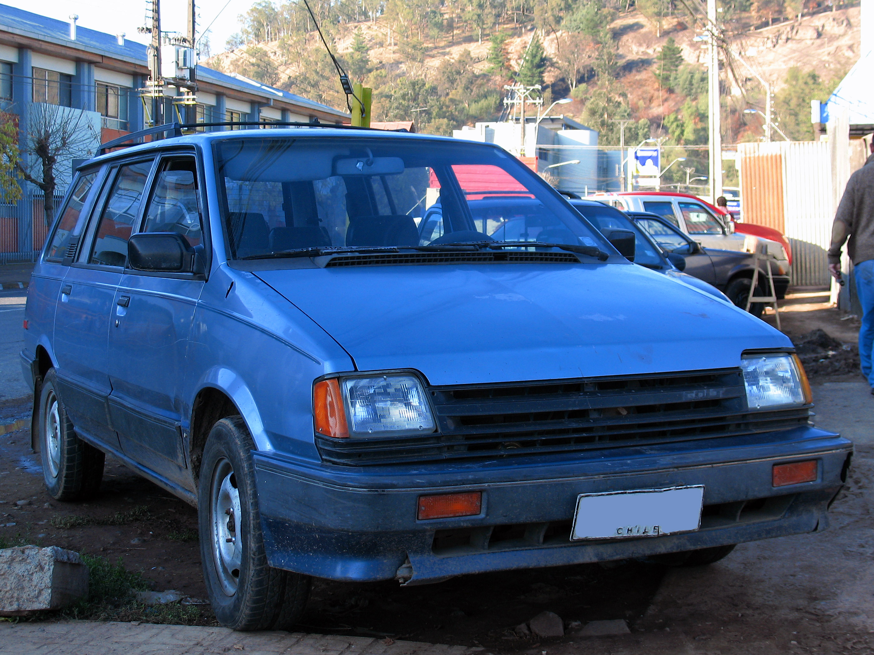 Dodge Colt Vista 2.0 1988